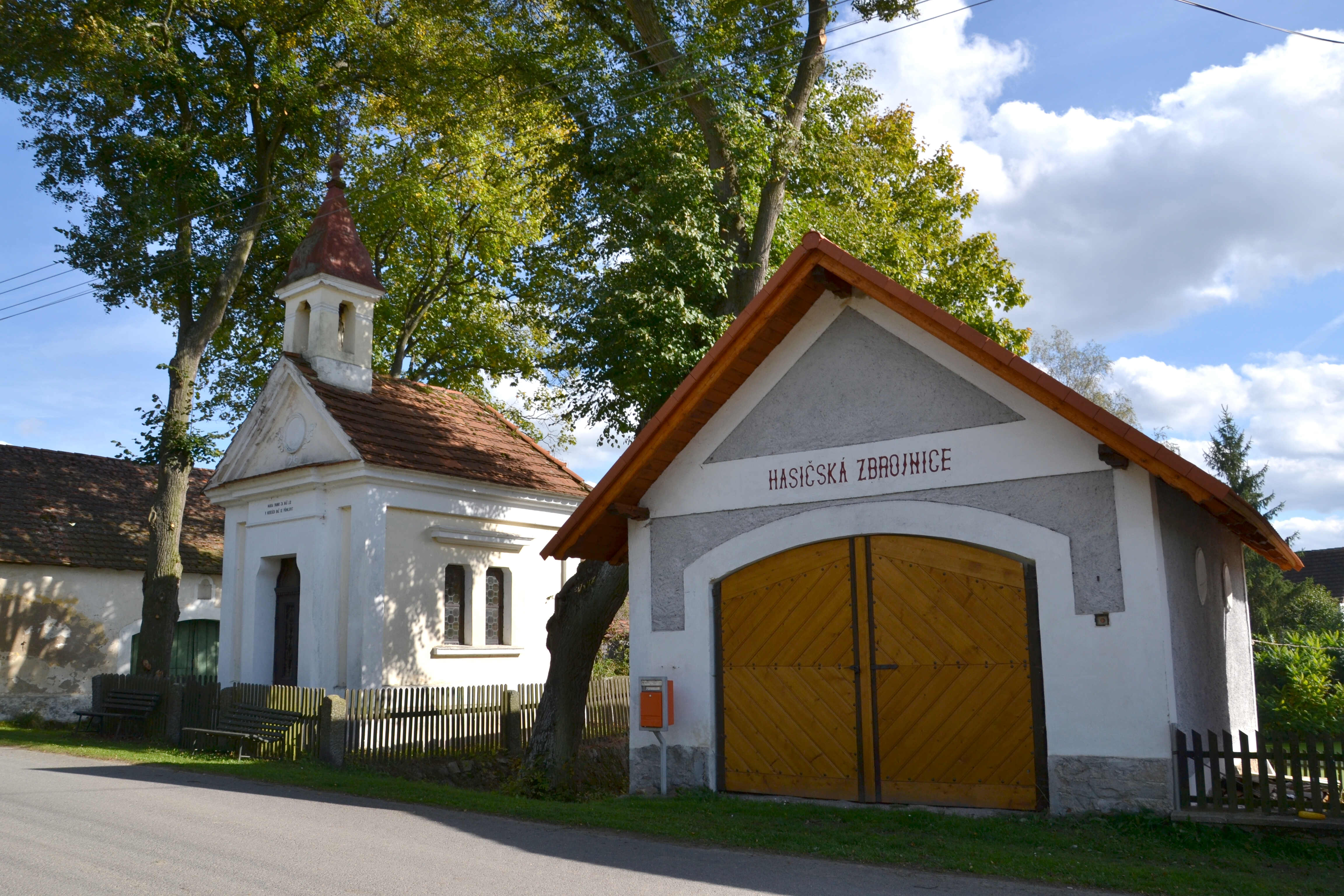 Vůsí, část obce Květov, okres Písek